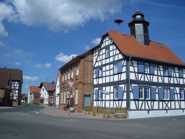 Titel: Die alte Schule im Büdinger Stadtteil Vonhausen